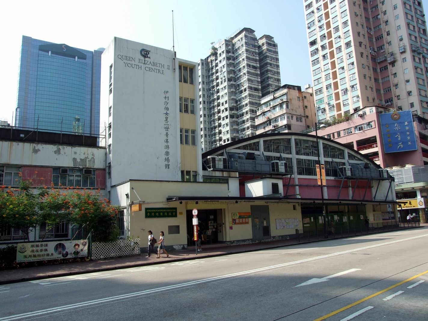 麥花臣室內場館